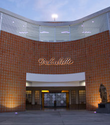 Fachada interna de la entrada principal del Colegio Benavente. Plantel Centro.